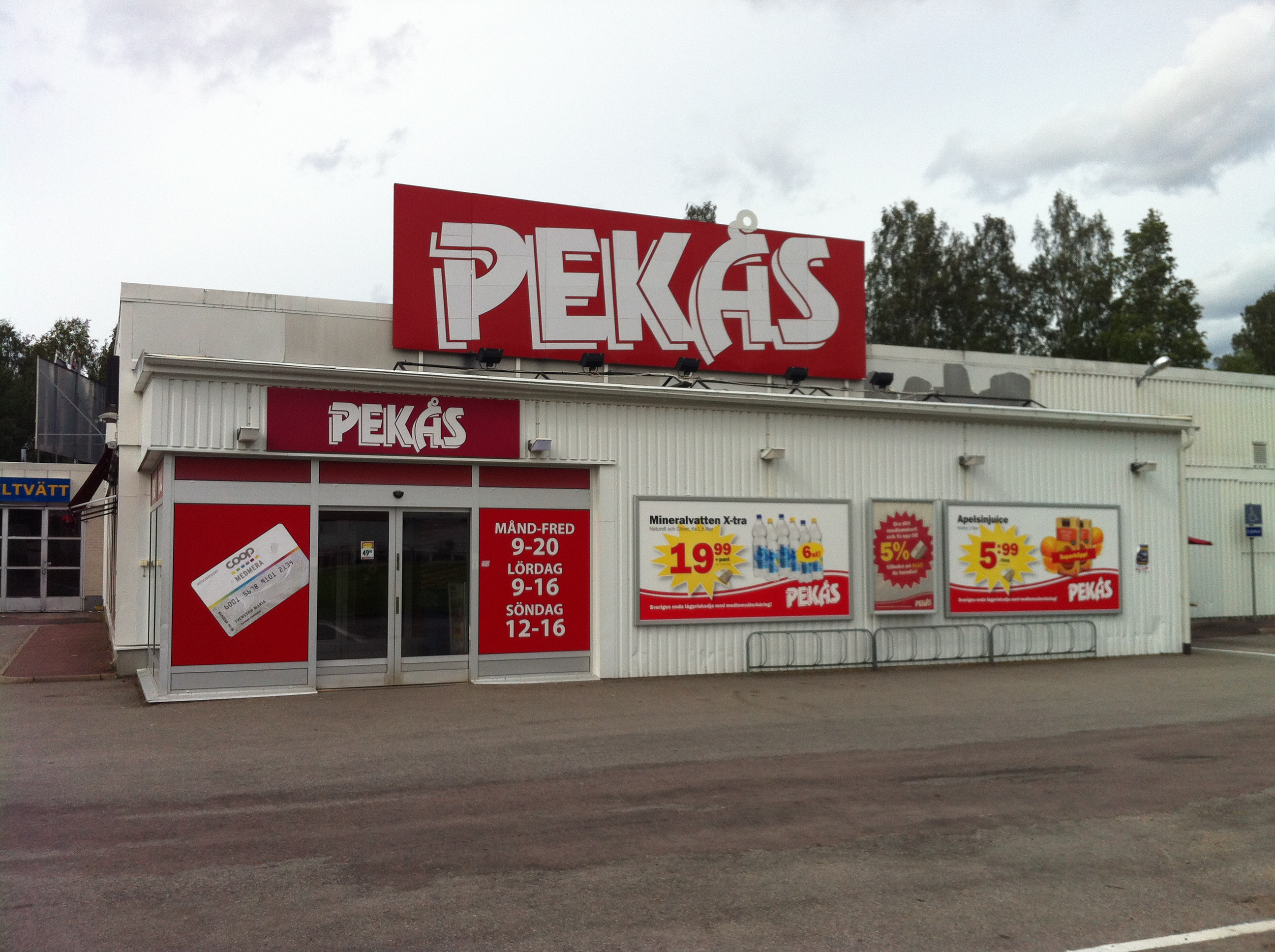 Pekåsbutiken i Hagfors